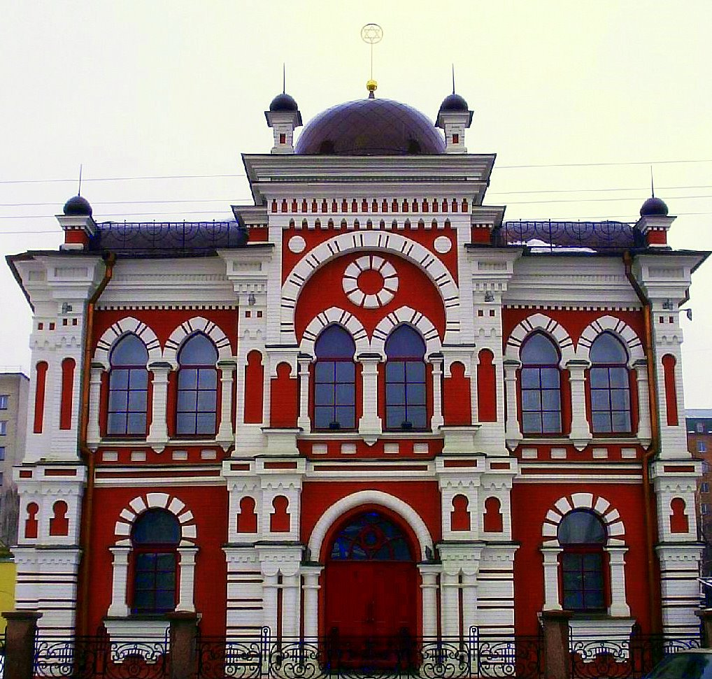 Синагога на Подолі вул. Щекавицька, 29 в Киеве.